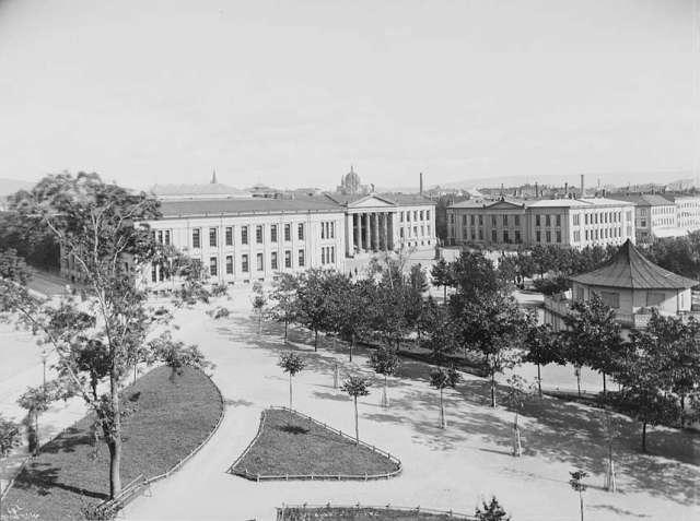 The University of Oslo